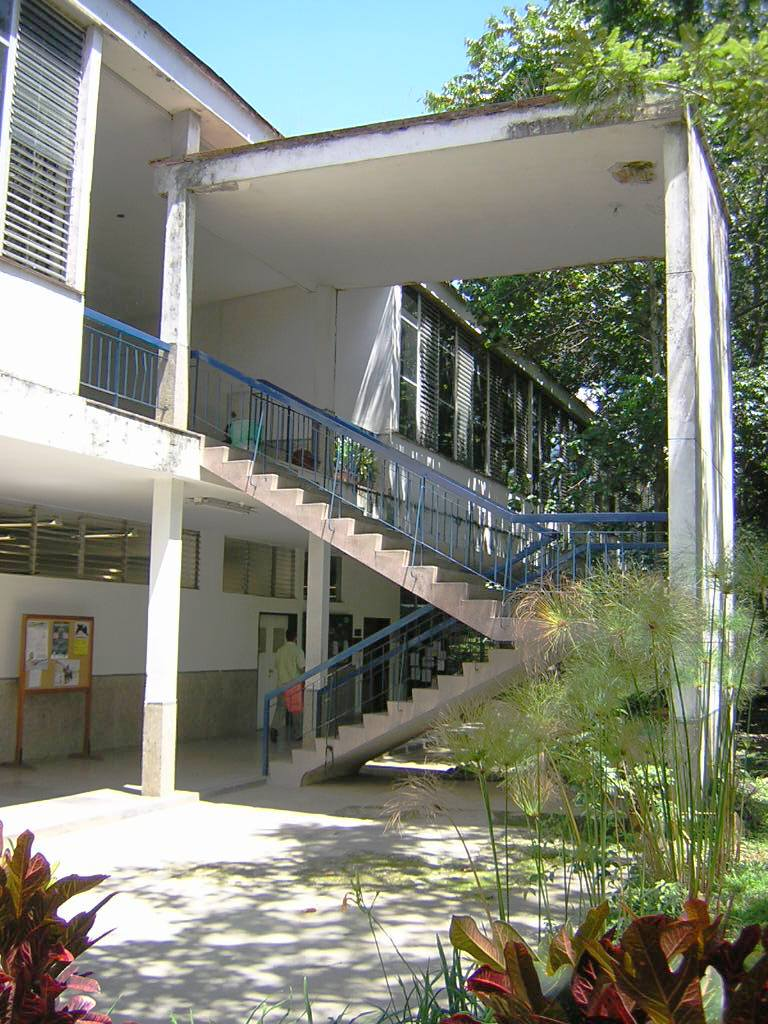 Escalera Bloque 44, Ciudadela Robledo, Universidad de Antioquia, Medellín, Colombia (esta foto la tome yo, y la libero al dominio público)